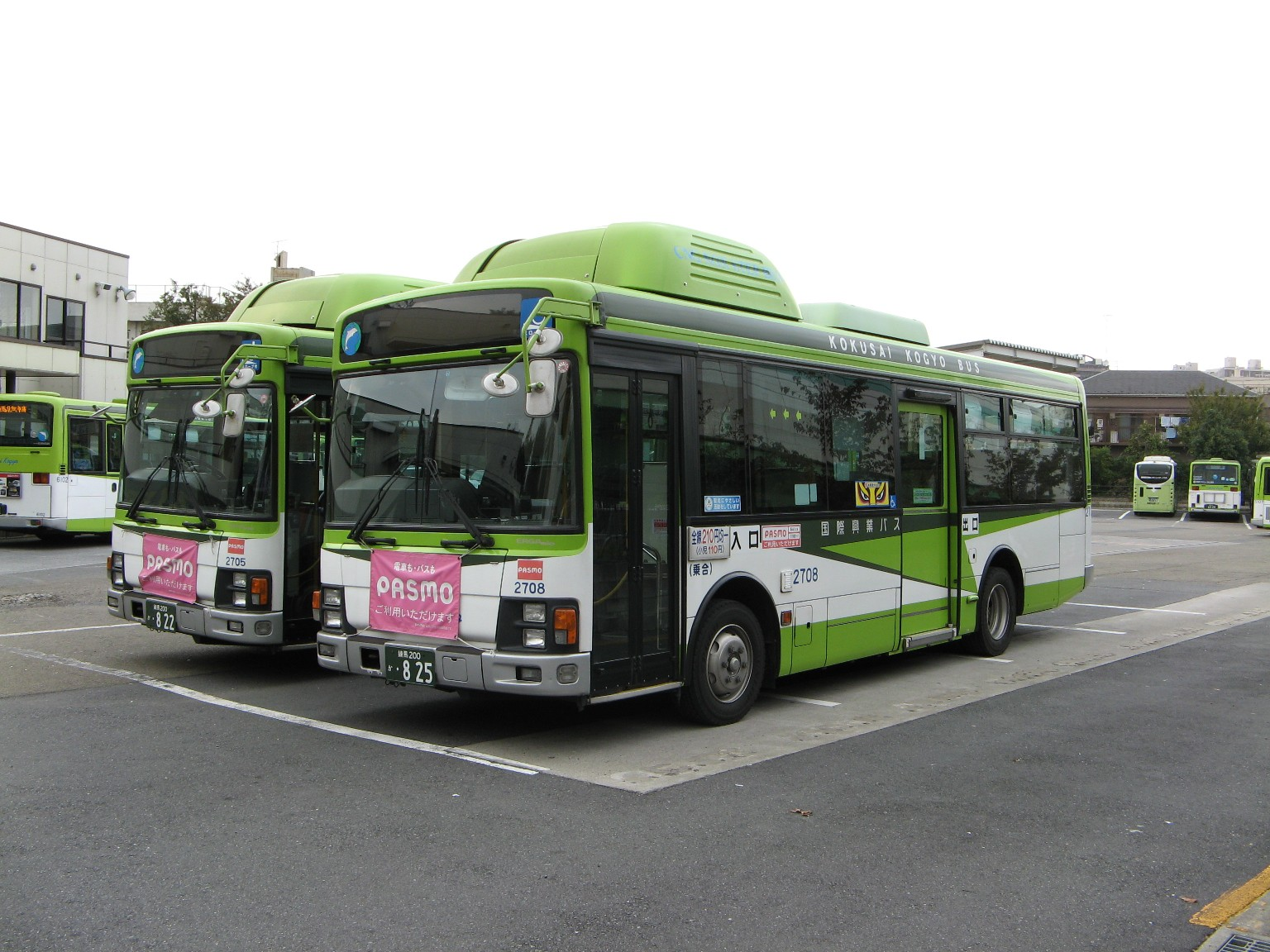 国際興業練馬営業所敷地外より撮影した2708号車。